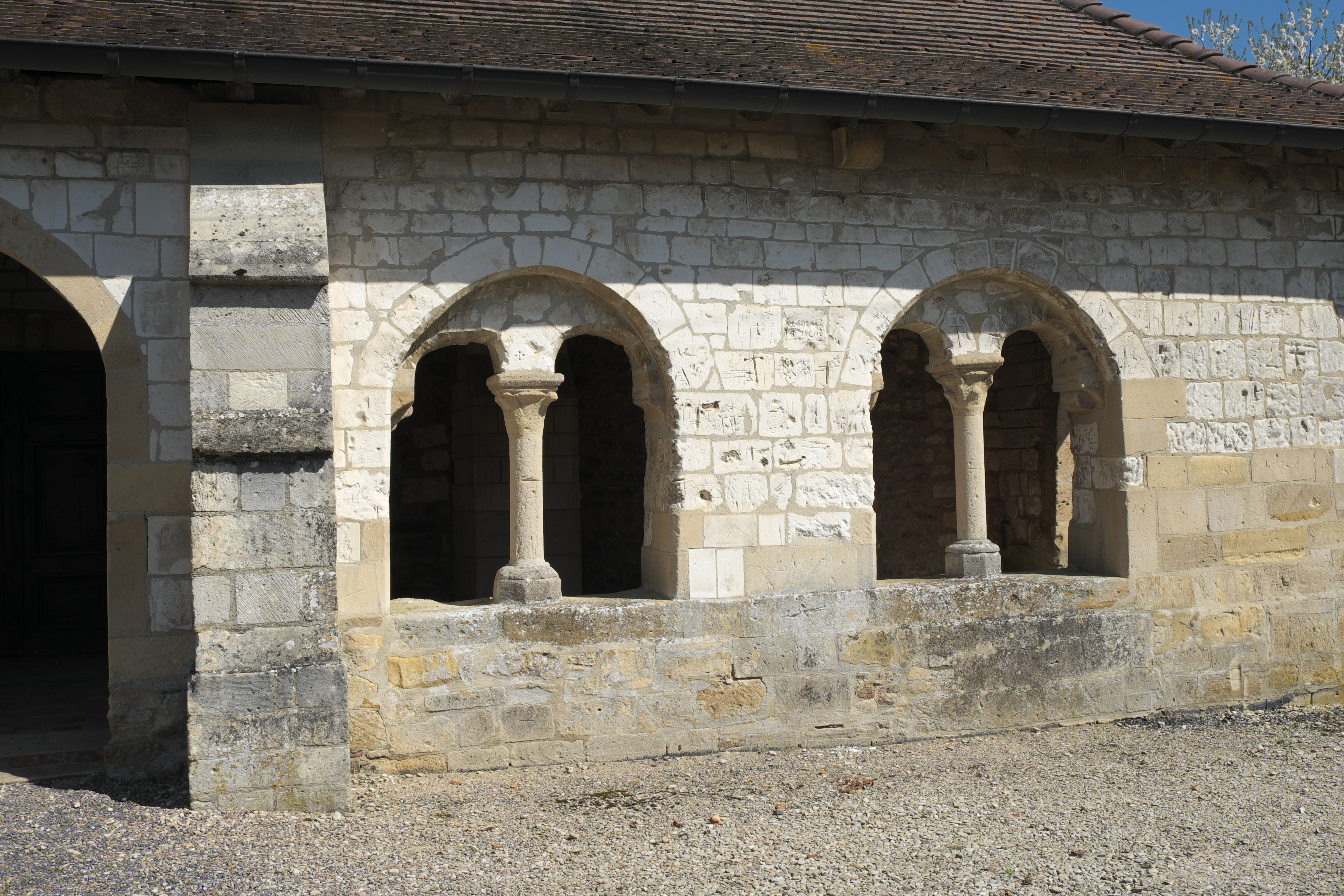 Katholische Kirche Saint-Symphorien in Ponthion im Département Marne in der Region Grand Est/Frankreich, Vorhalle